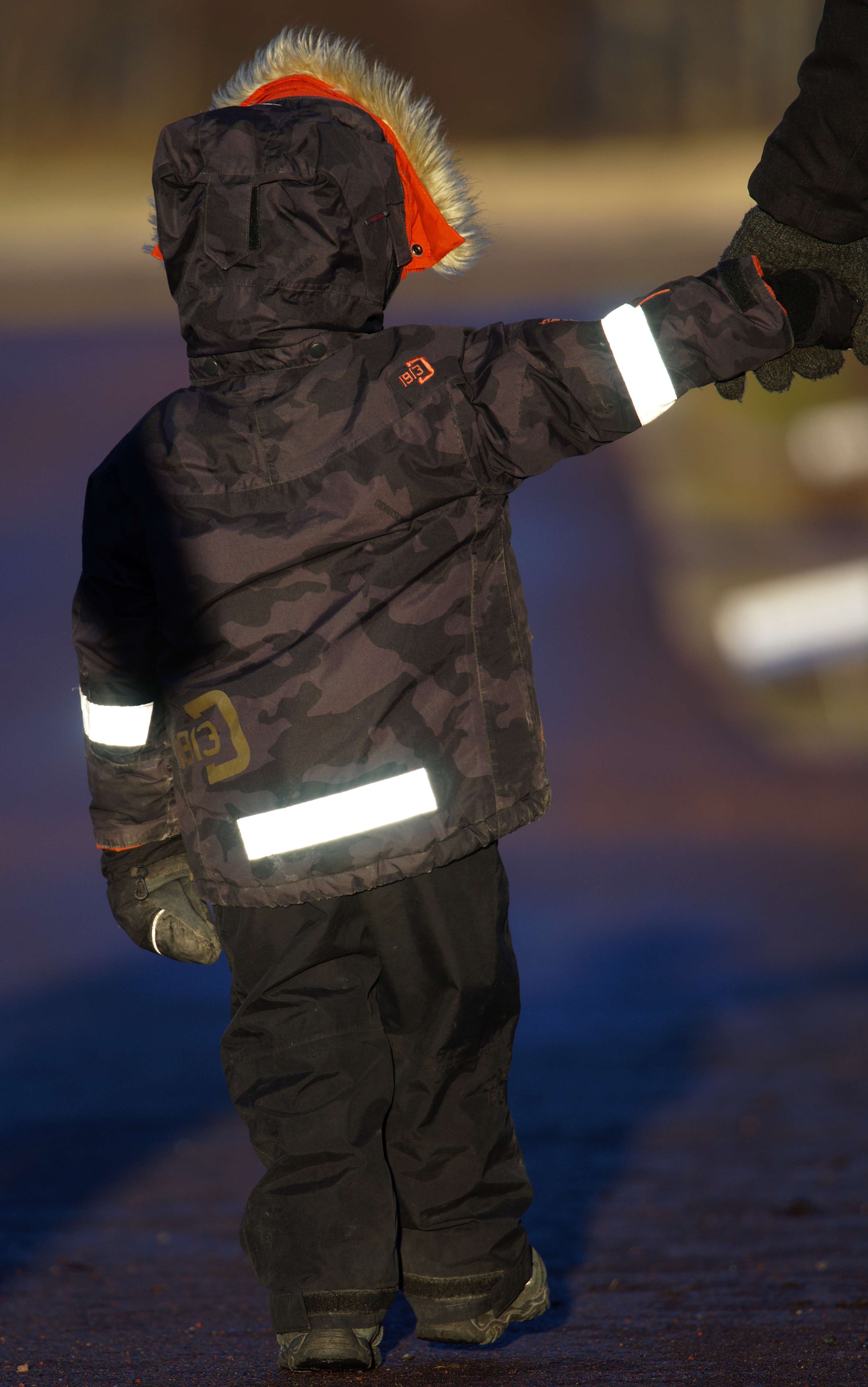 Reflexer på en pojkes jacke.